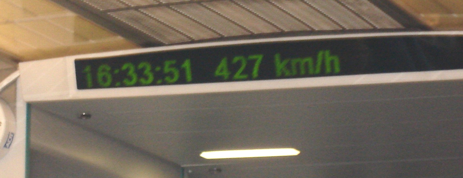 Transrapid displej koji pokazuje brzinu od 427 km/h